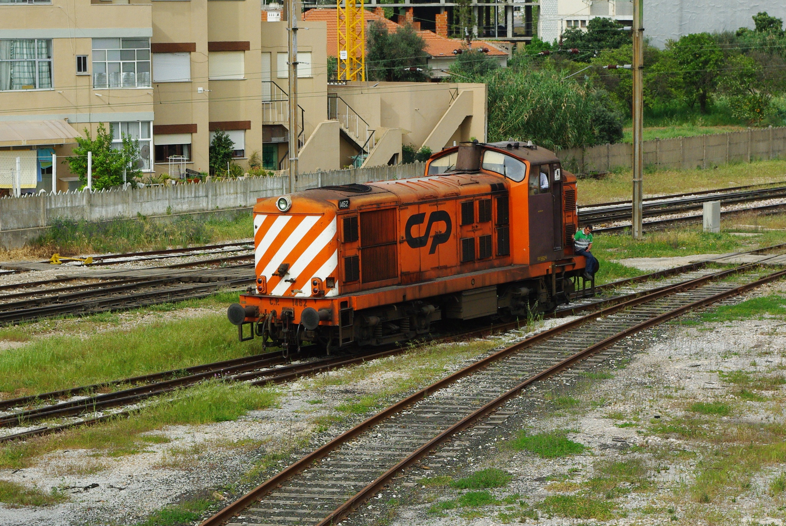 O más, muchas mas, despues de 40 años al servicio, las 1400 siguen dando la talla, ahora como locomotoras de maniobras. Esta ayer mismo se entretenia en Entroncamento empujando y tirando de vagones de mercancias